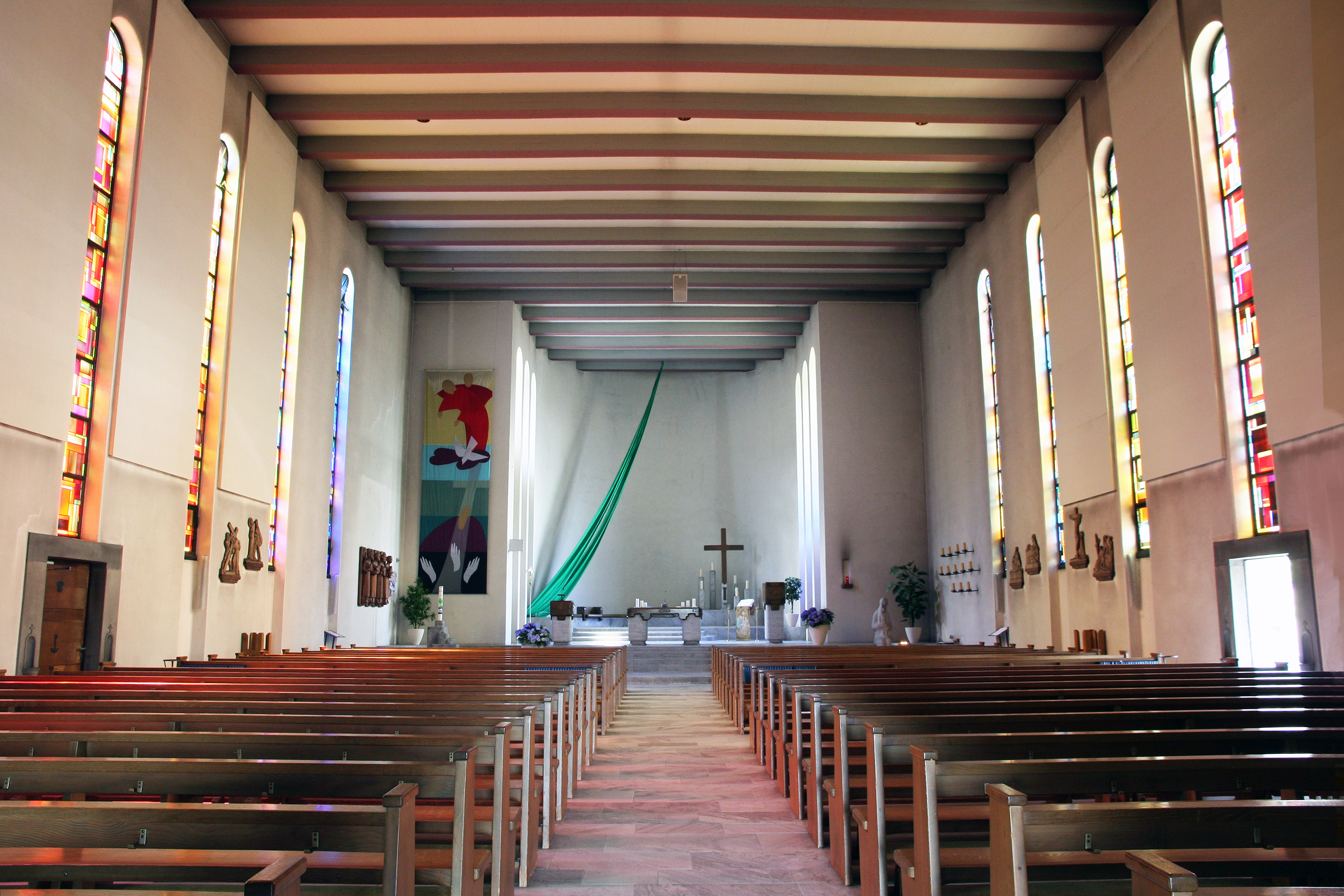 Römisch-katholische Pfarrkirche St. Josef Horgen, Innenansicht